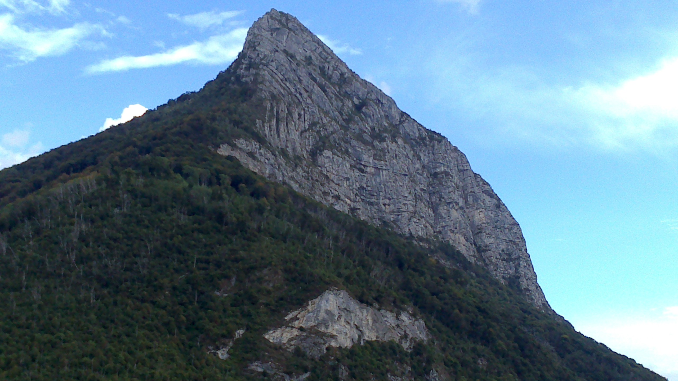 Néron : versant nord depuis Quaix-en-Chartreuse